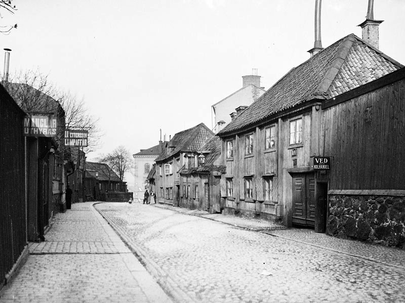 Fjällgatan 6, 8 och 10, österut. Nuvarande Mäster Mikaels Gata 6-10